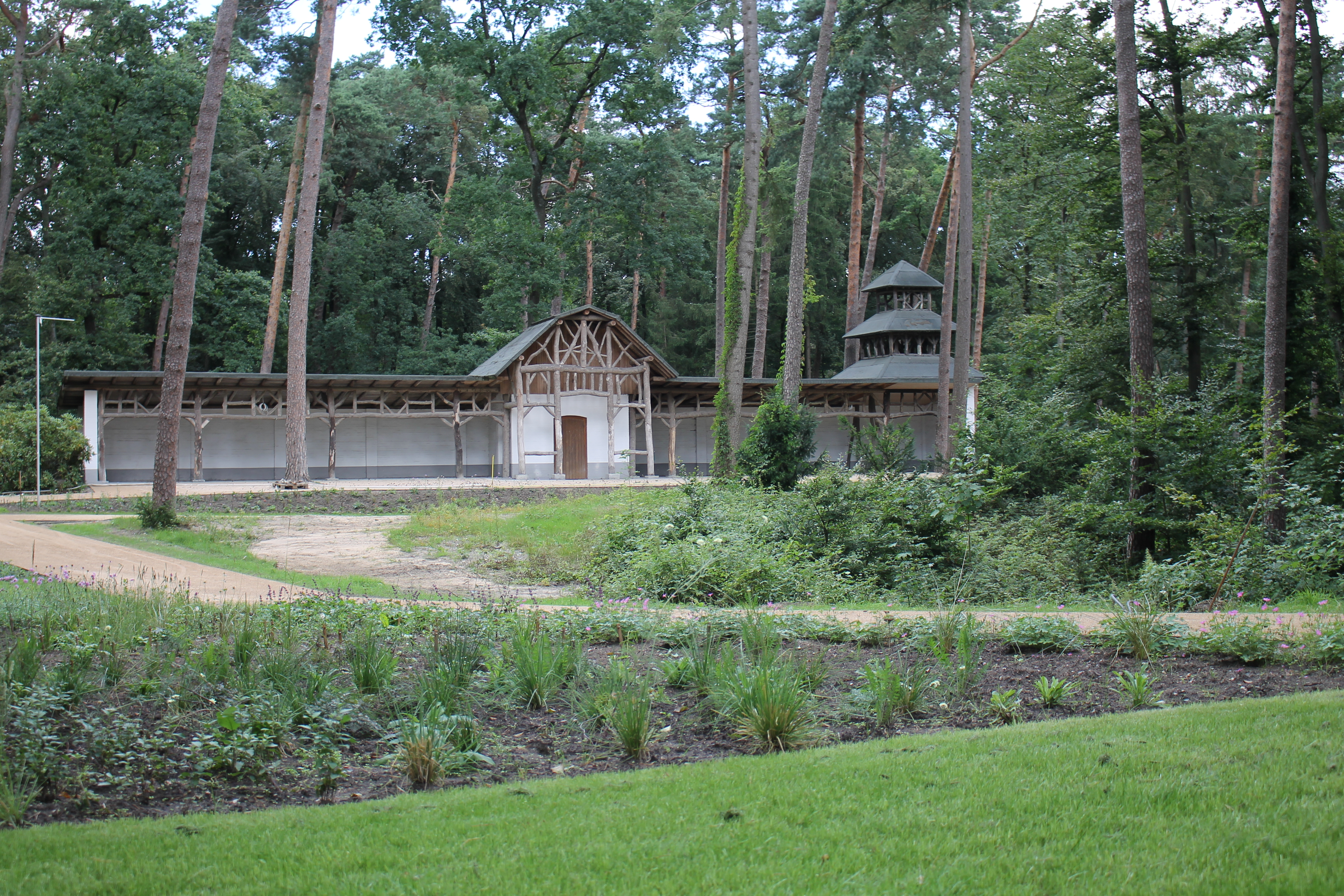 Diese Liegehalle ist die letzte vorhandene im alten Kurwald von Bad Lippspringe